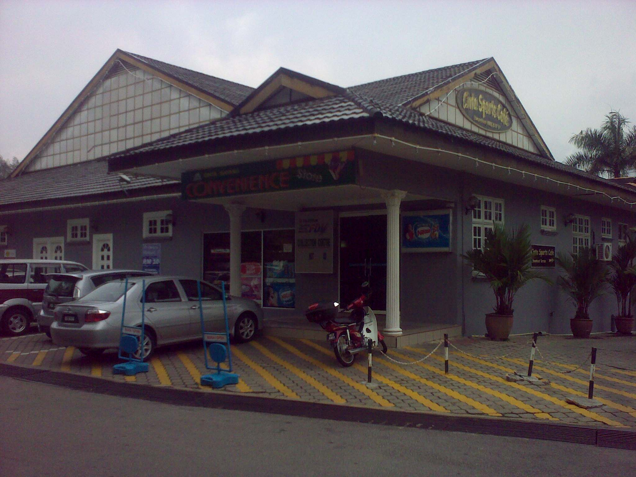 Convenience Store, Cinta Sayang Resort Sungai Petani